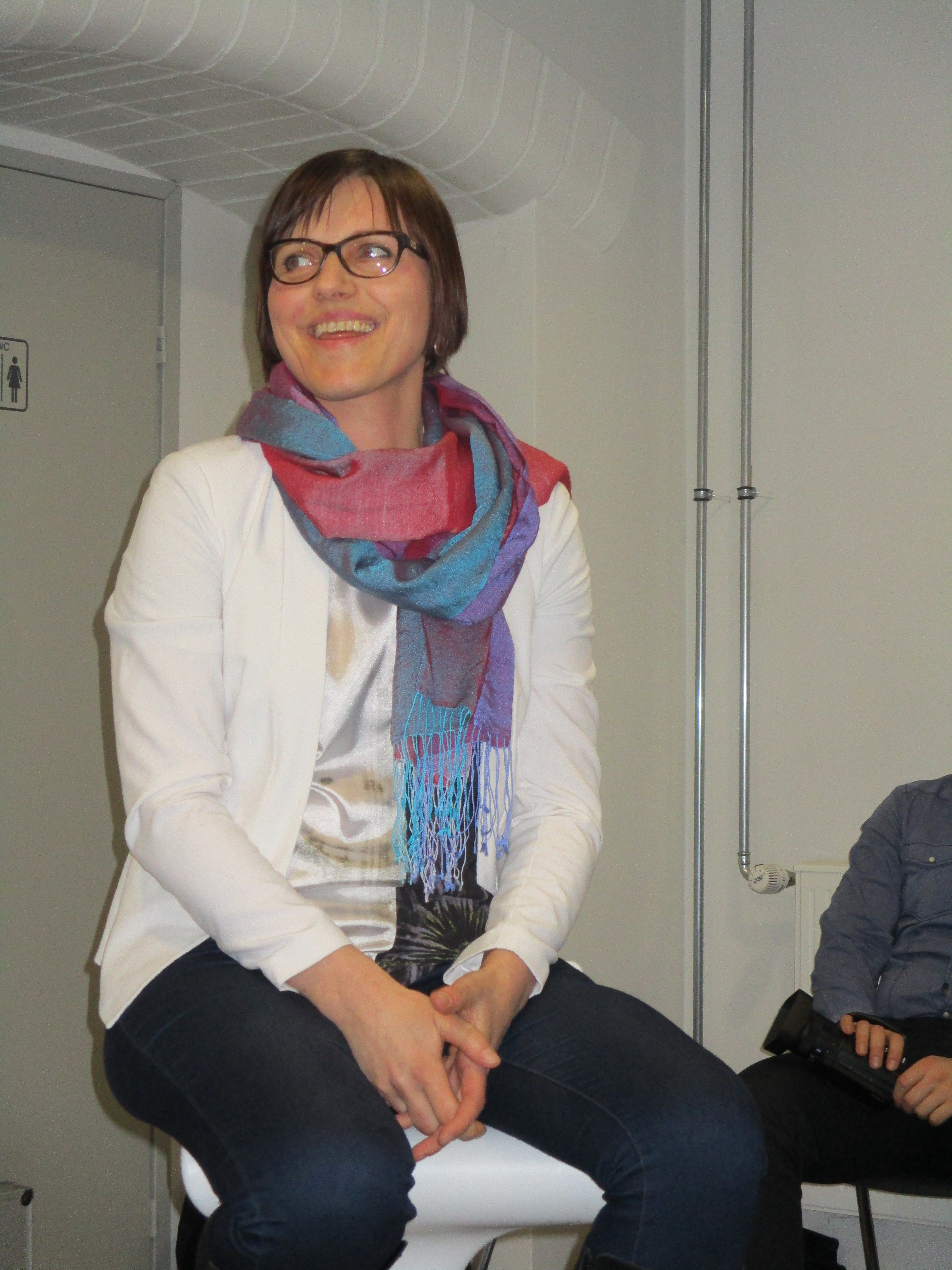 Anneli Ohvril Viljandi Kultuuriakadeemia Vilma majas 23. veebruaril 2018 a. "talk show"s rääkimas enda poolt veetud maailmakoristuse ja kilepakendiprojektide kogemustest.